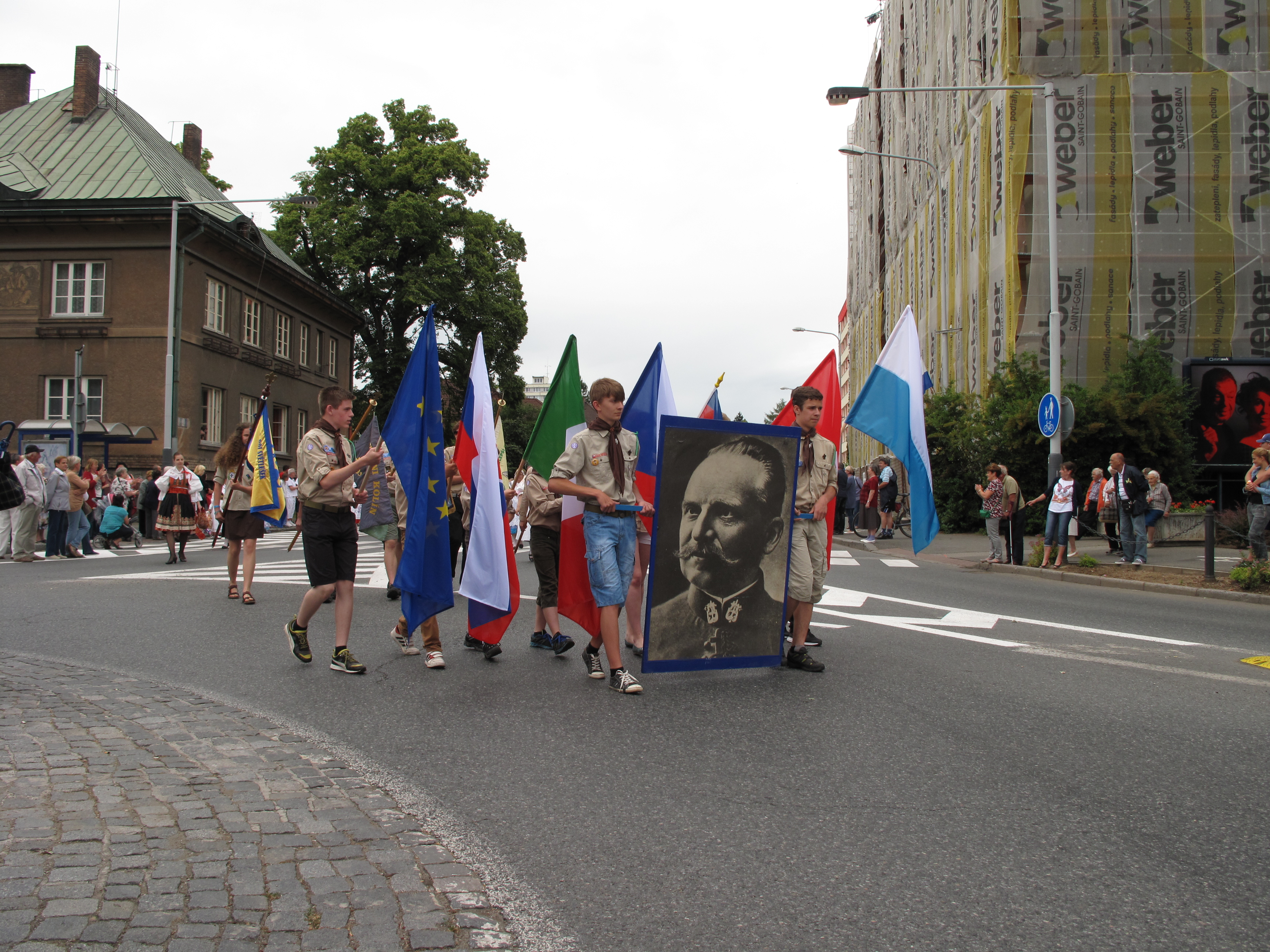 Začátek průvodu mažoretek na festivalu Kmochův Kolín 2016. Okres Kolín, Česká republika.